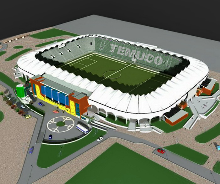 Estadio German Becker